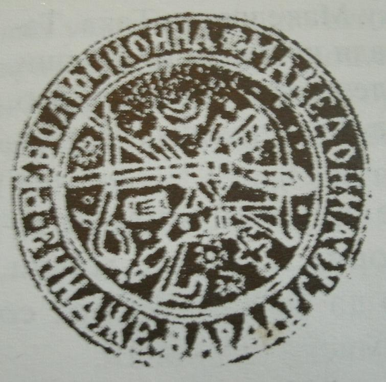 Печат на Ениджевардарския революционен район на ВМОРО.